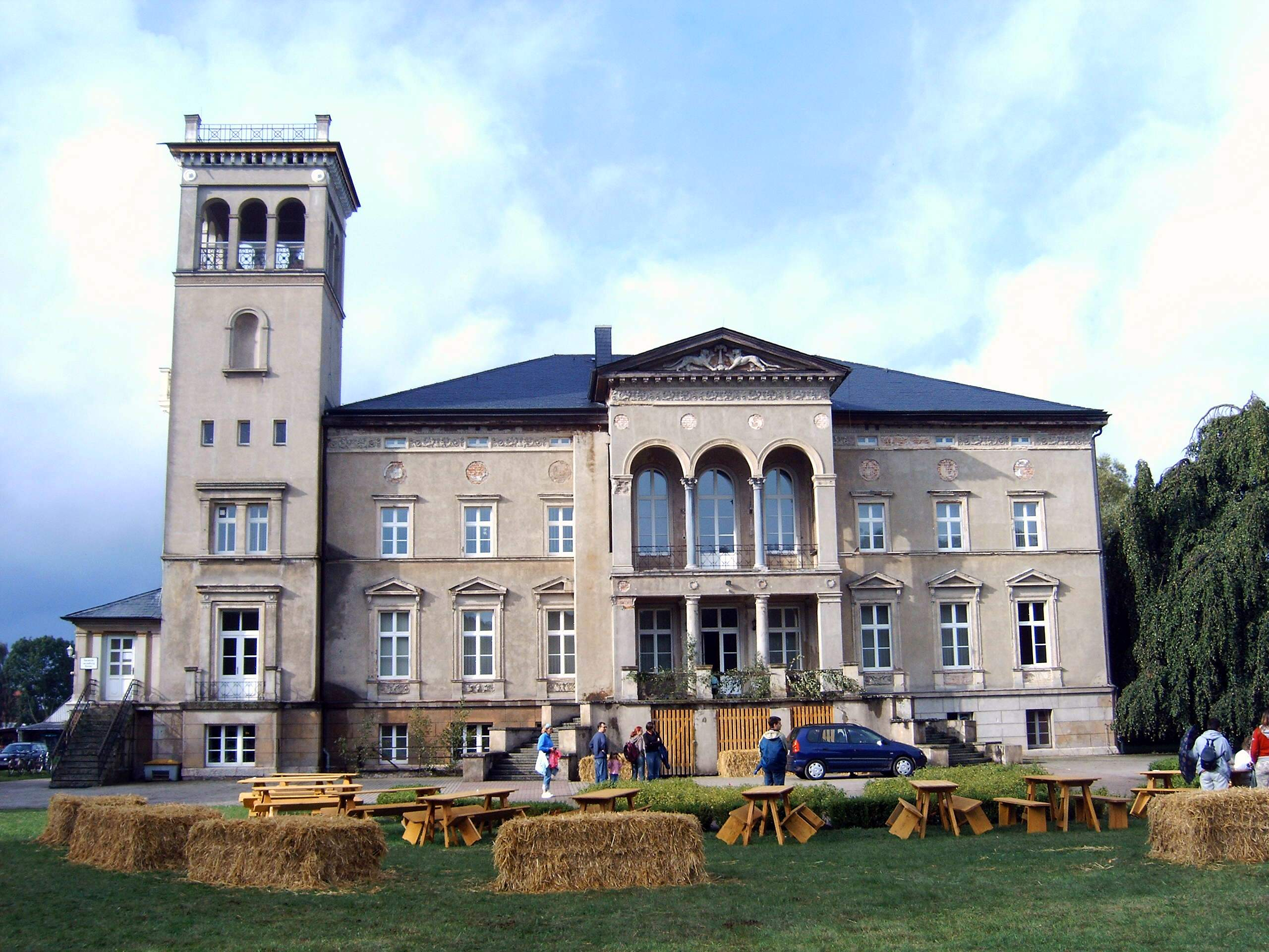 Schloss Kunrau, Sachsen-Anhalt, Deutschland Bild aufgenommen am 26.8.2006 von Olaf Meister